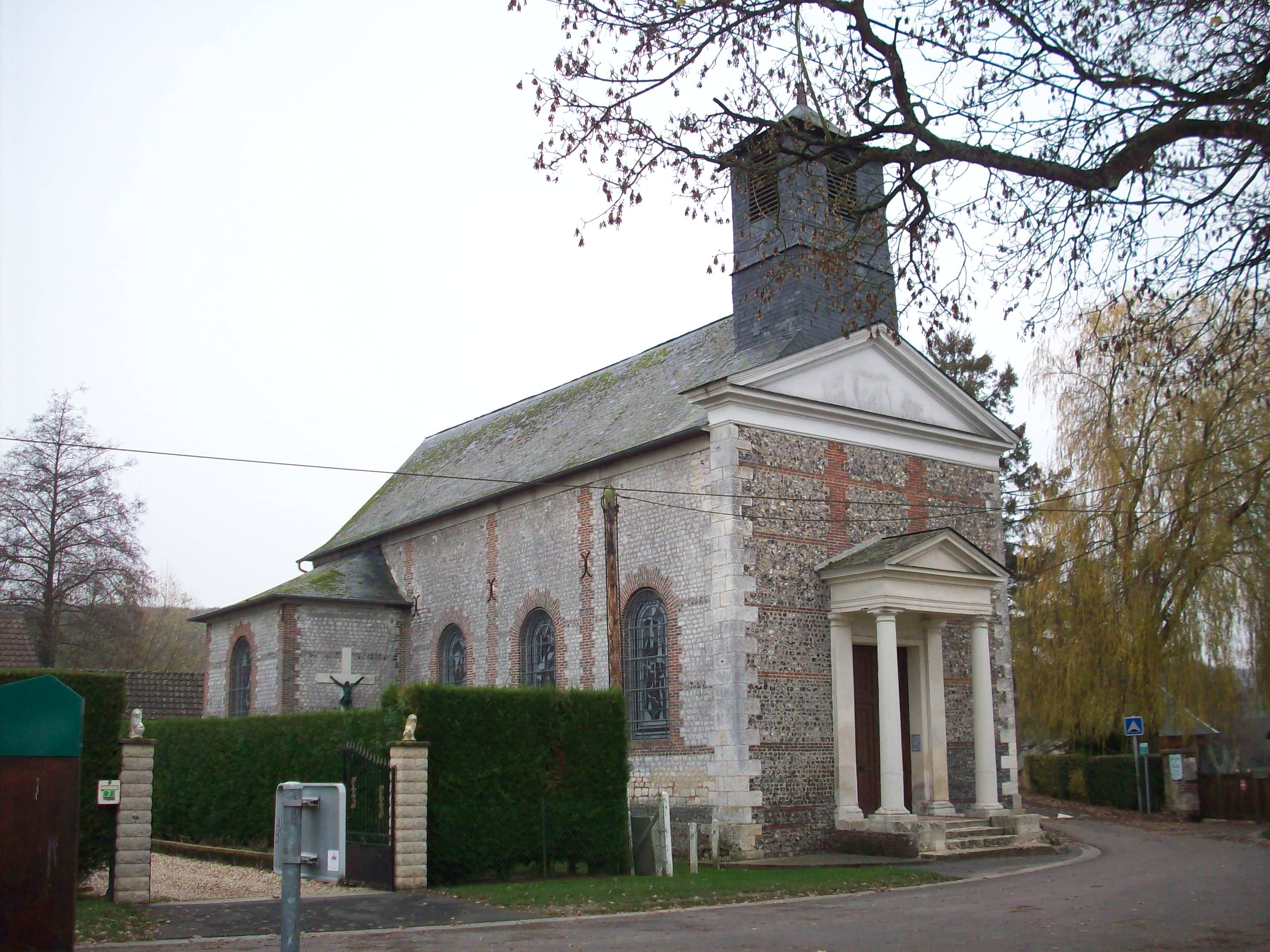 Eglise Saint-Pierre et Saint-Paul d'Elbeuf-sur-Andelle.